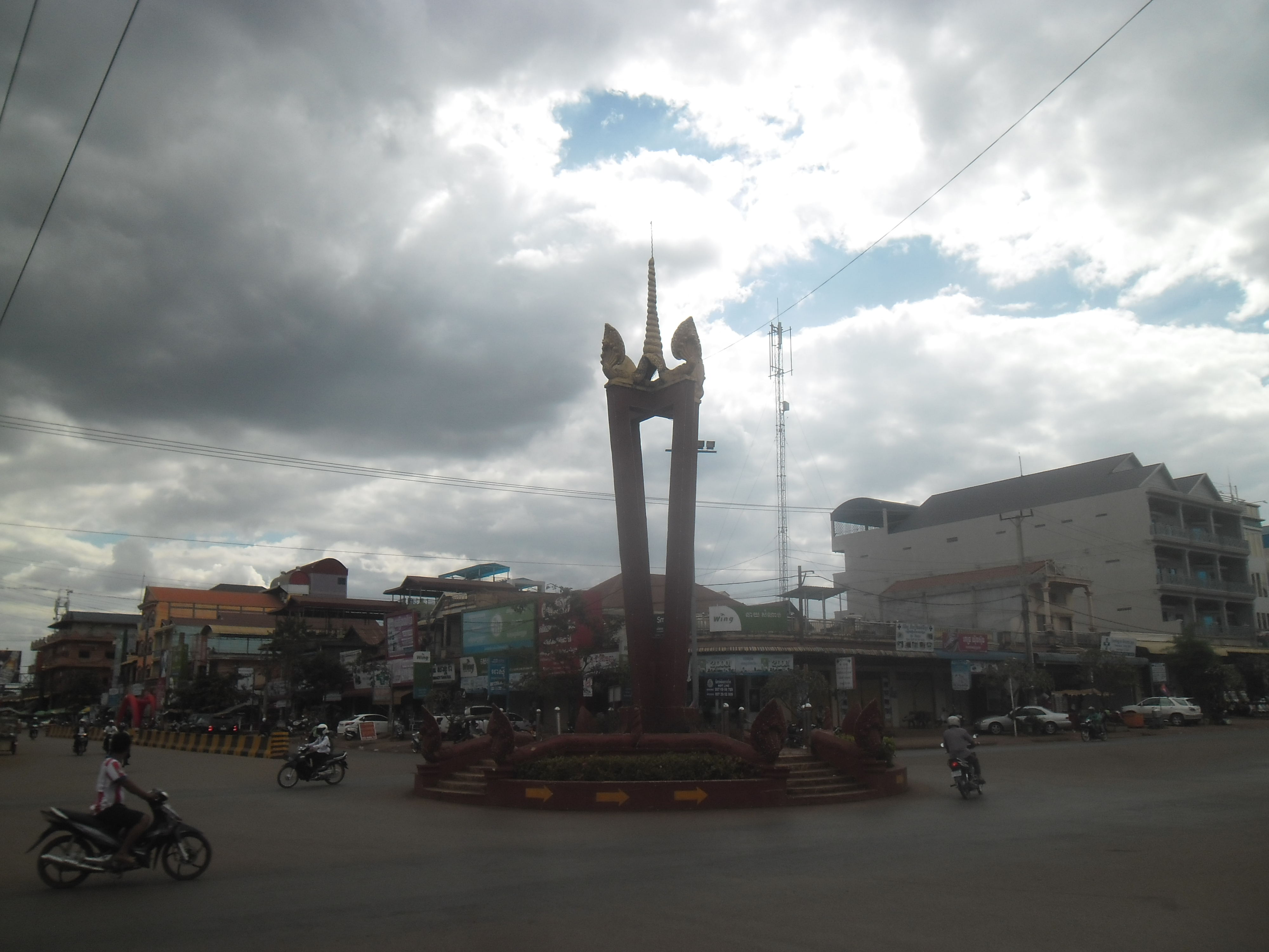 Banlung